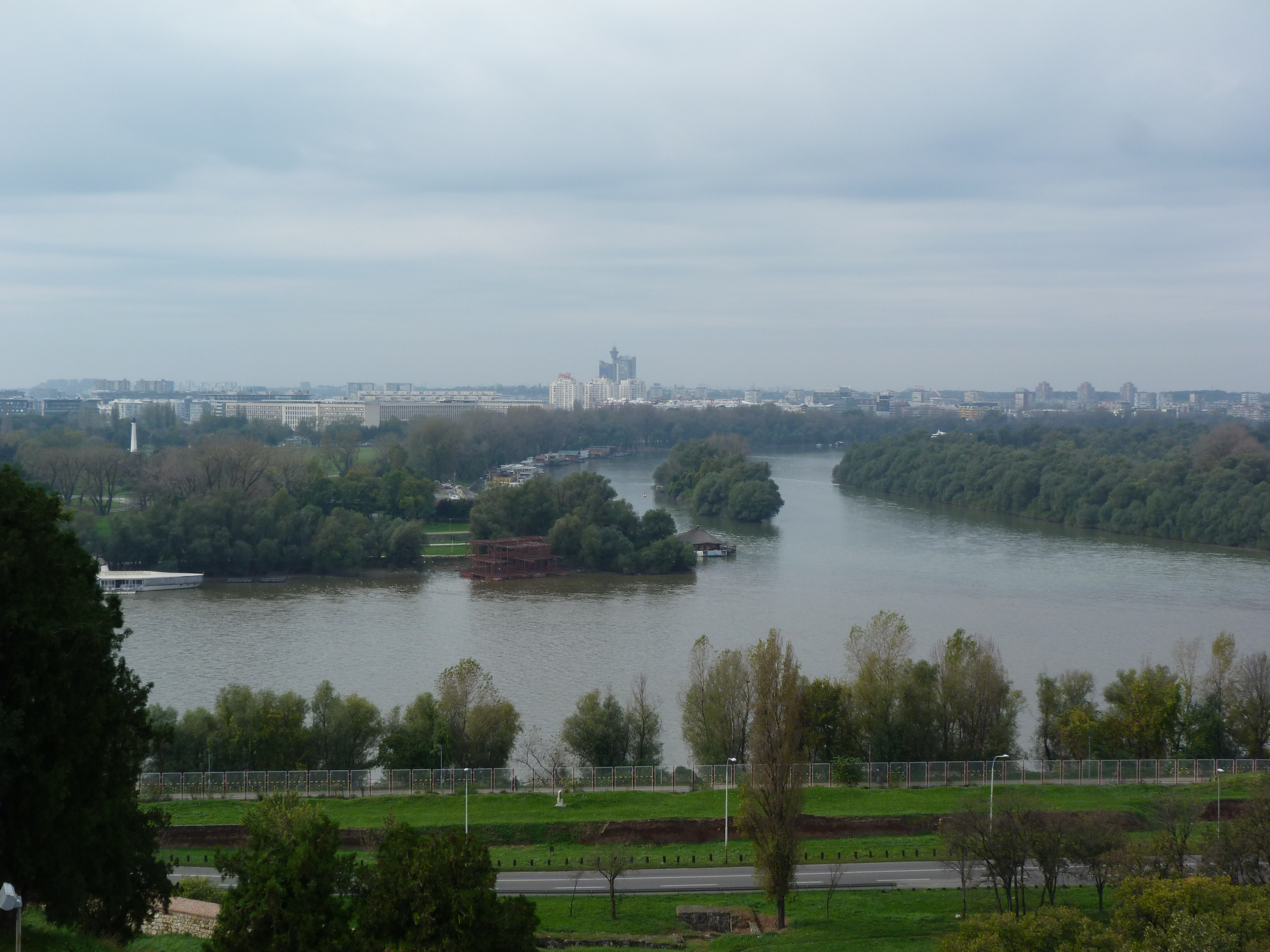 A felvétel 2014. október 21-én készült Nándorfehérváron. ©© Derzsi Elekes Andor, Budapest, 2014, A kép egészben, vagy részletekben másolását, bármilyen úton történő sokszorosítását és felhasználását a szerző ellenérték nélkül, jogutódjaira is kihatóan megengedi. Az engedély kiterjed a kereskedelmi célú hasznosításra is. Kéri azonban nevének feltüntetését a felhasználás során. A Metapolisz sorozat valamennyi képe és filmje Creative Commons alatti valamint kereskedelmi - for profit - célra is felhasználható. Ajánlott hivatkozás: Derzsi Elekes Andor: Metapolisz DVD line